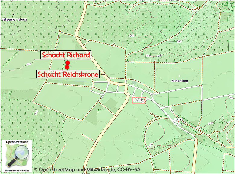 Lage der Schachtröhren der einstigen Kaliwerke "Gewerkschaften Richard und Reichskrone"